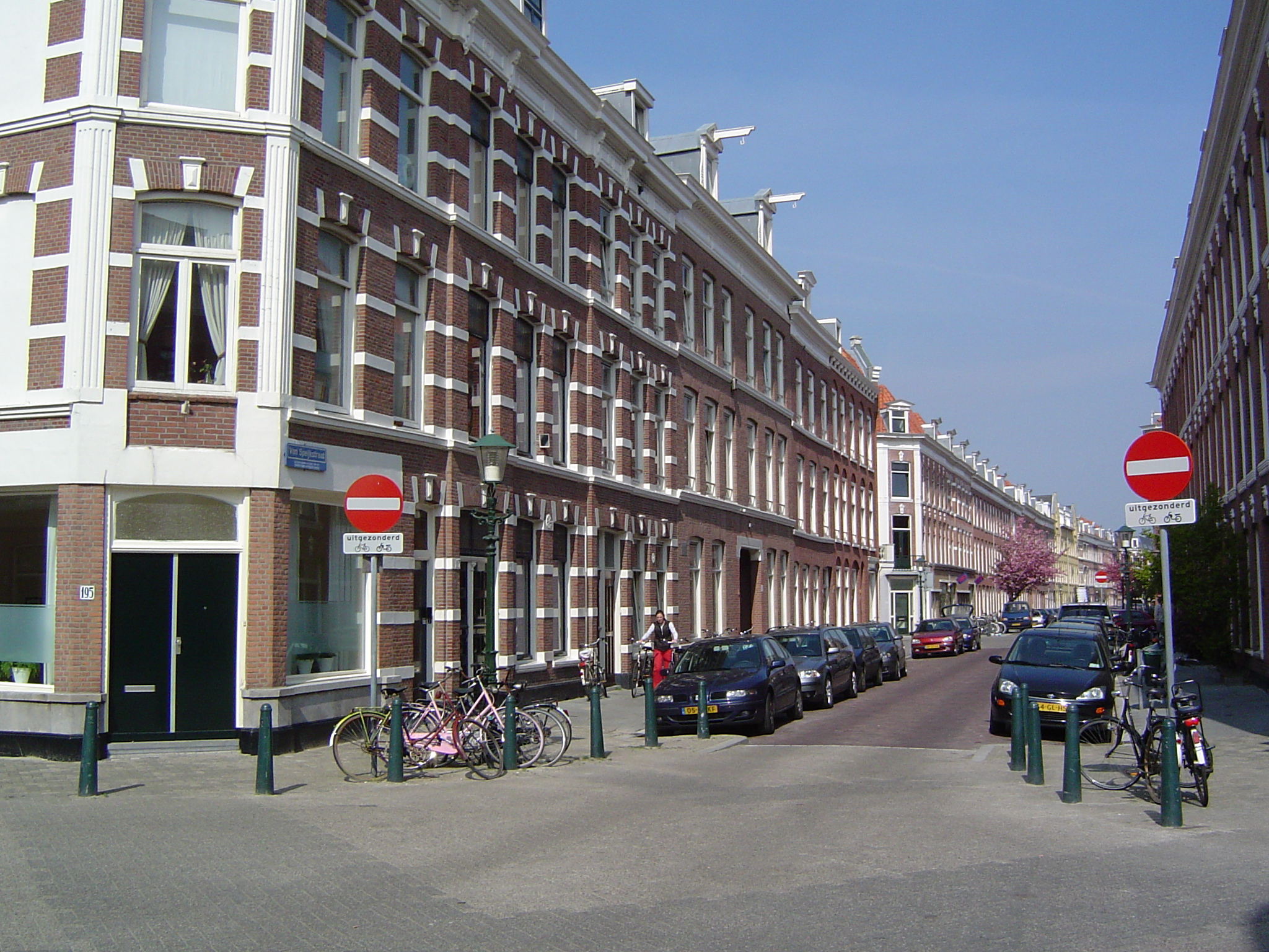 Van Speijkstraat, Den Haag Made by Joris 2004